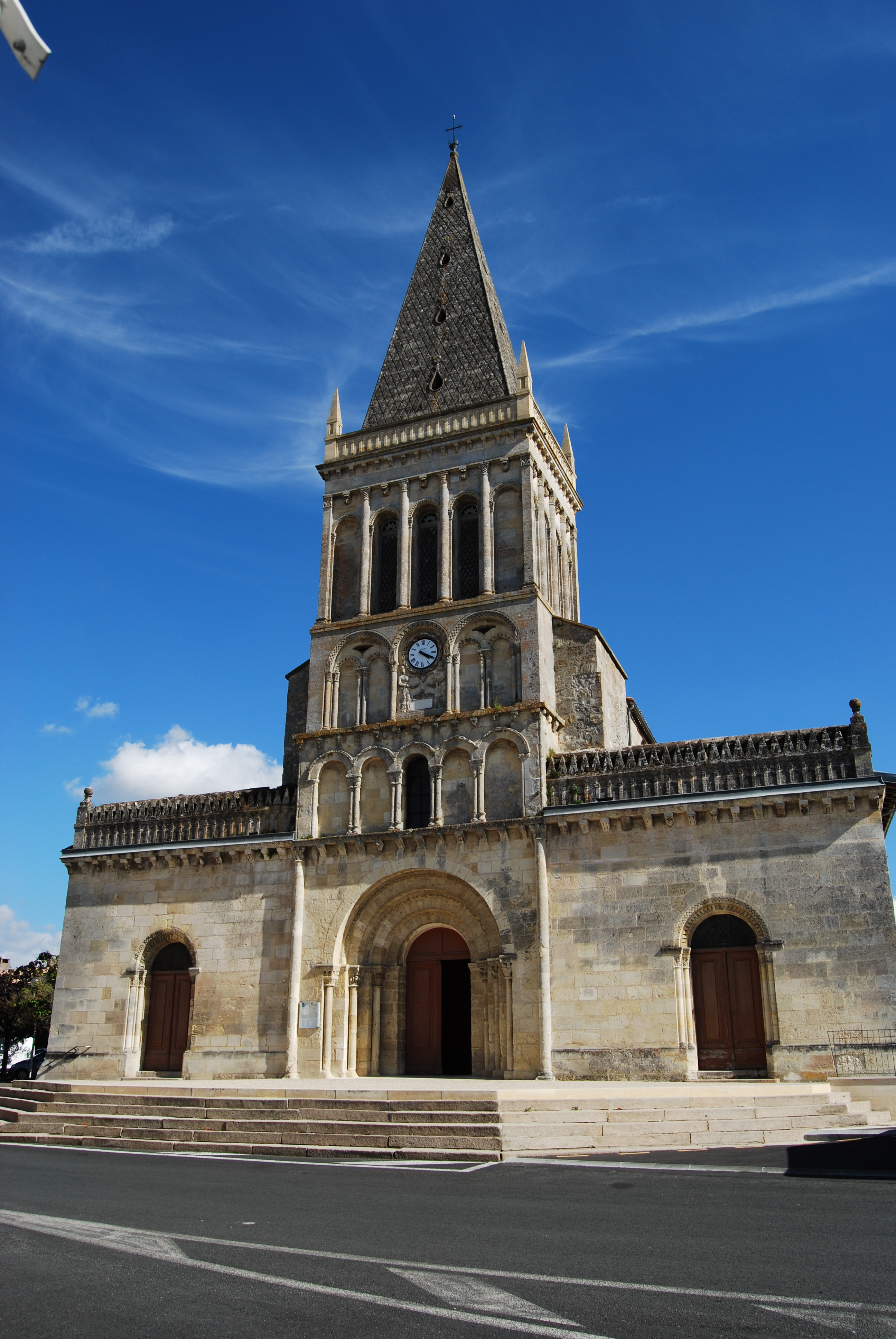 Église Saint-Pierre d'Ambarès-et-Lagrave, (Inscrit, 2002)